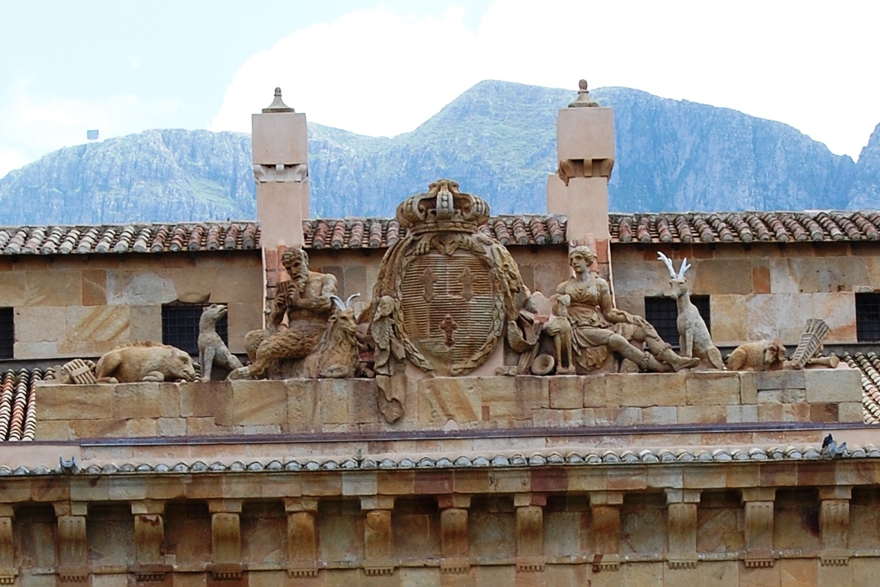 Bosco della Ficuzza, Sicily Casina reale di caccia